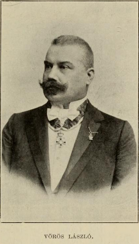 Portrait of Vörös László (miniszter)